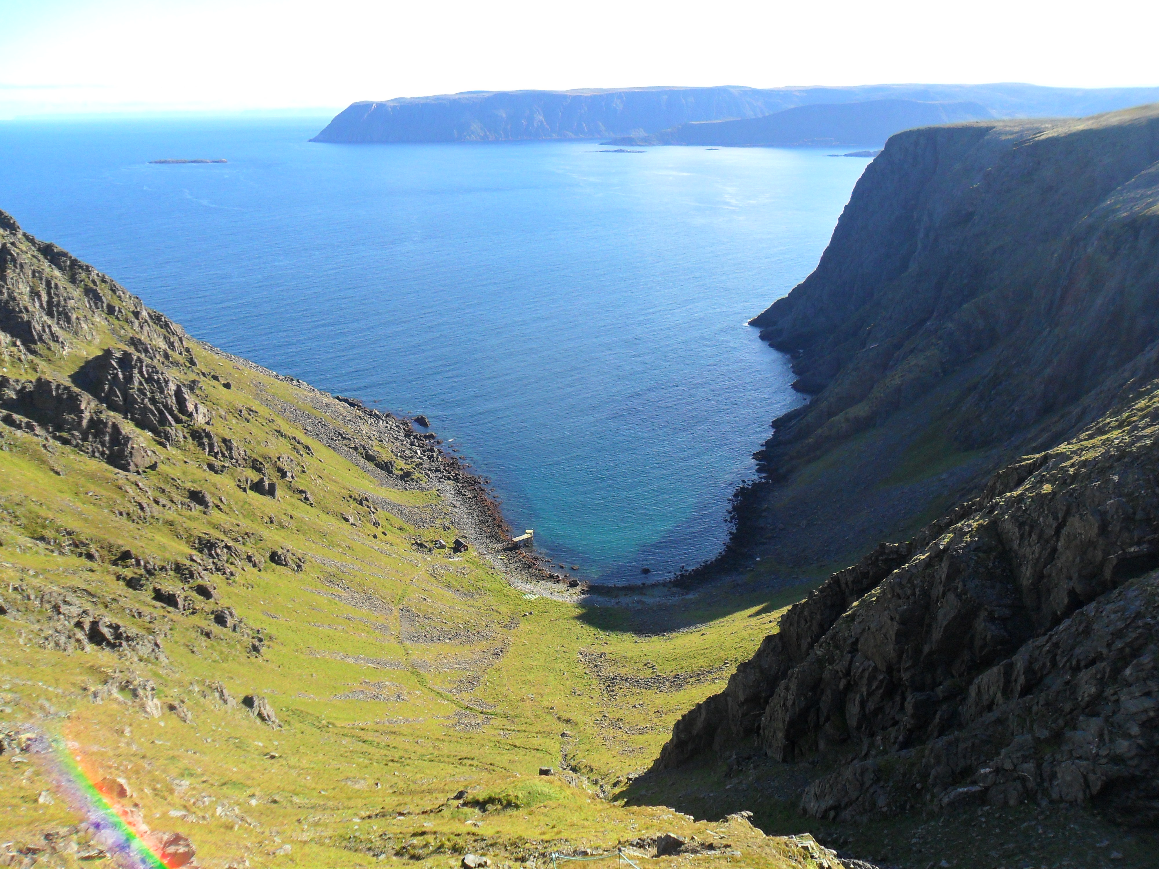 Hornviken